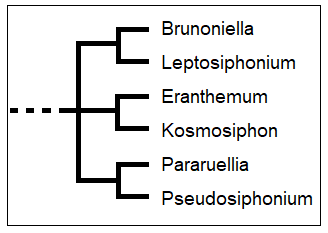 Cladogramma_della_sottotribù Erantheminae (Acanthaceae)